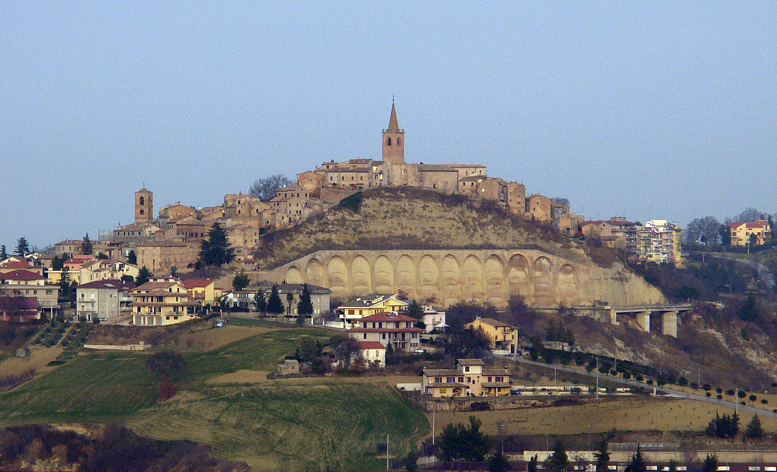 Foto presa a Ripaberarda